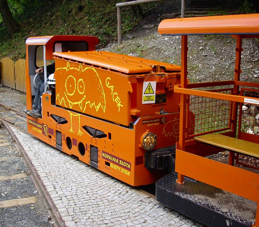 Lokomotywa akumulatorowa Gacek wykorzystywana do ciągnięcia pociągu z turystami w dawnej kopalni złota w Złotym Stoku.